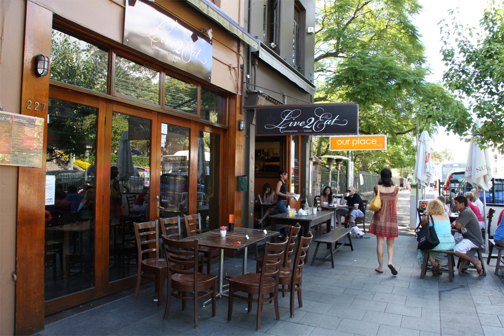 Shopping Area in Balmain